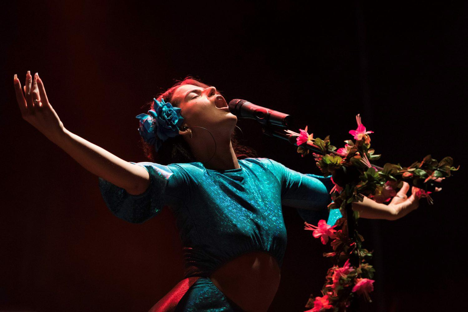 El arranque de las fiestas de San Isidro ha convertido la ciudad de Madrid en un gran escenario de música y baile. Ayer viernes 11 de mayo, miles de madrileños y madrileñas han dado la bienvenida a estas fiestas y han empezado a disfrutar de la enorme variedad de propuestas artísticas de su programación, repartida por toda la capital.